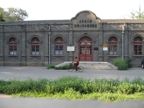 Shenyang - ecole primaire de Zhou Enlai